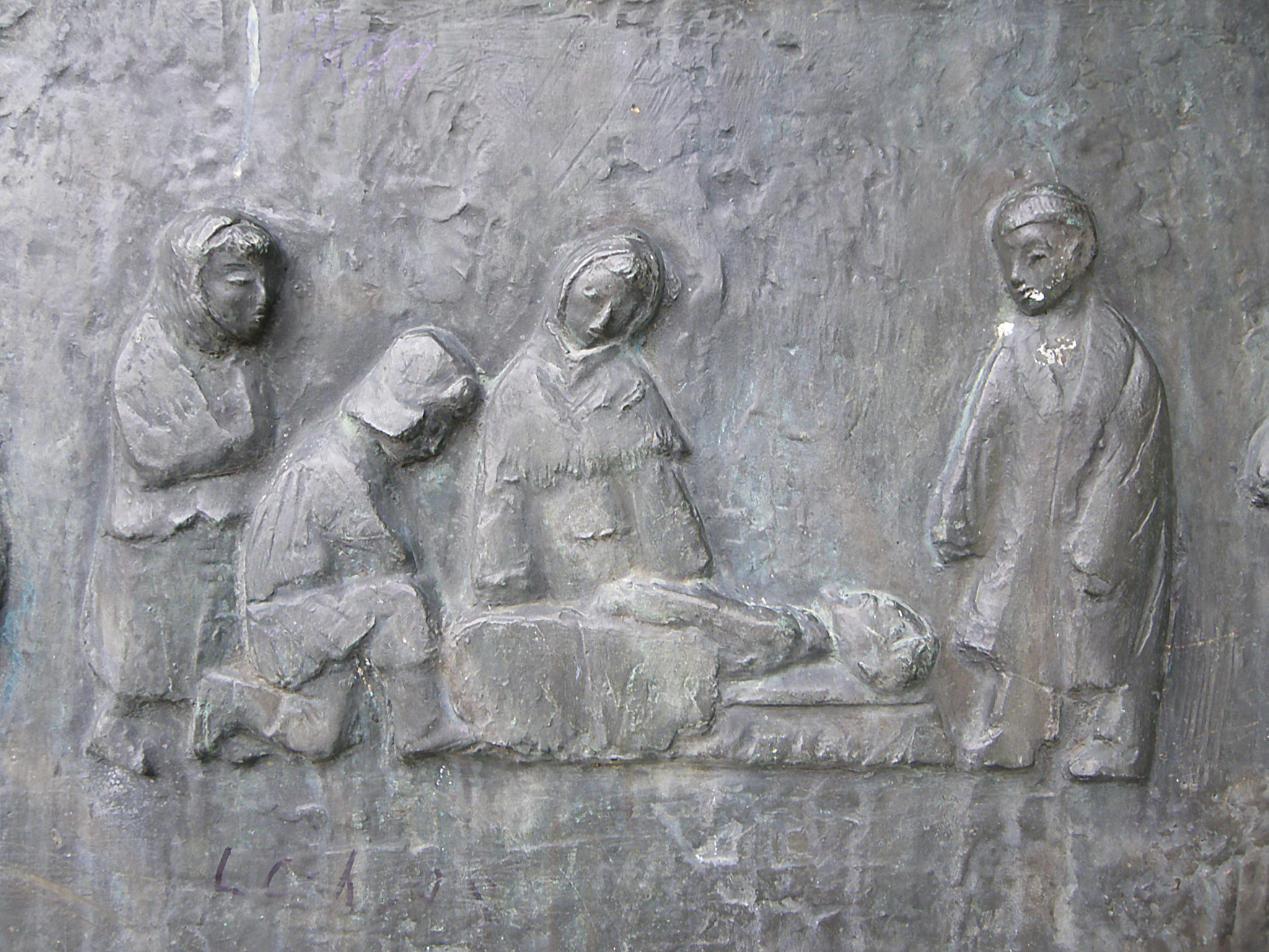 Gerhard Geyer (1907-1989), Kinderkreuzzug, 1974, Bronze-Relief (Detail) Freifläche Harzgeroder Straße 17